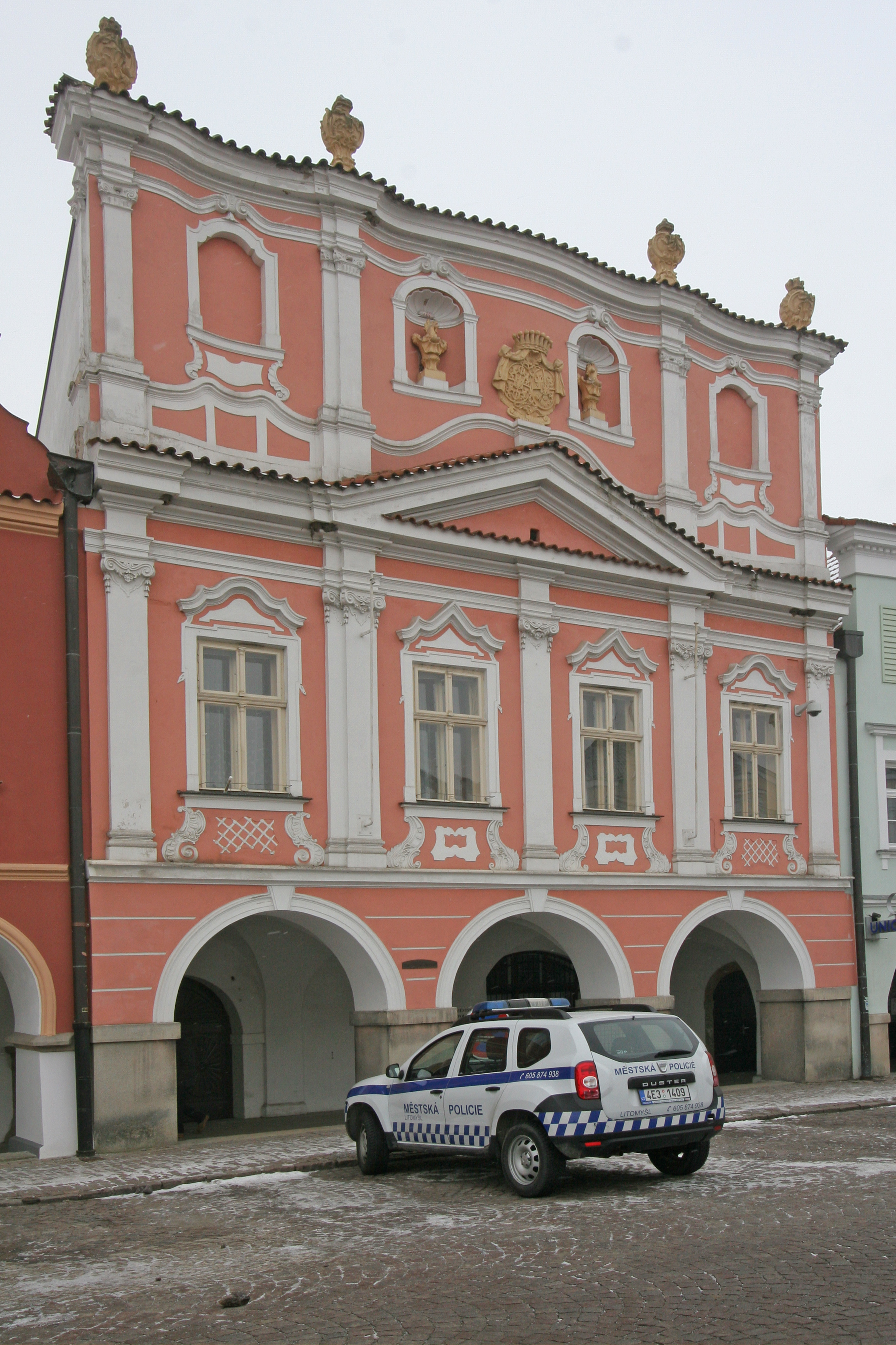 Radnice nová - měšťanský dům (Litomyšl), Smetanovo nám. 61, Litomyšl